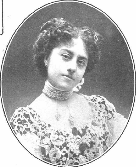 Fotografía de María Luisa Silva-Bazán y Fernández de Henestrosa publicada en 1914 con motivo del anuncio de su compromiso con el infante Fernando de Baviera